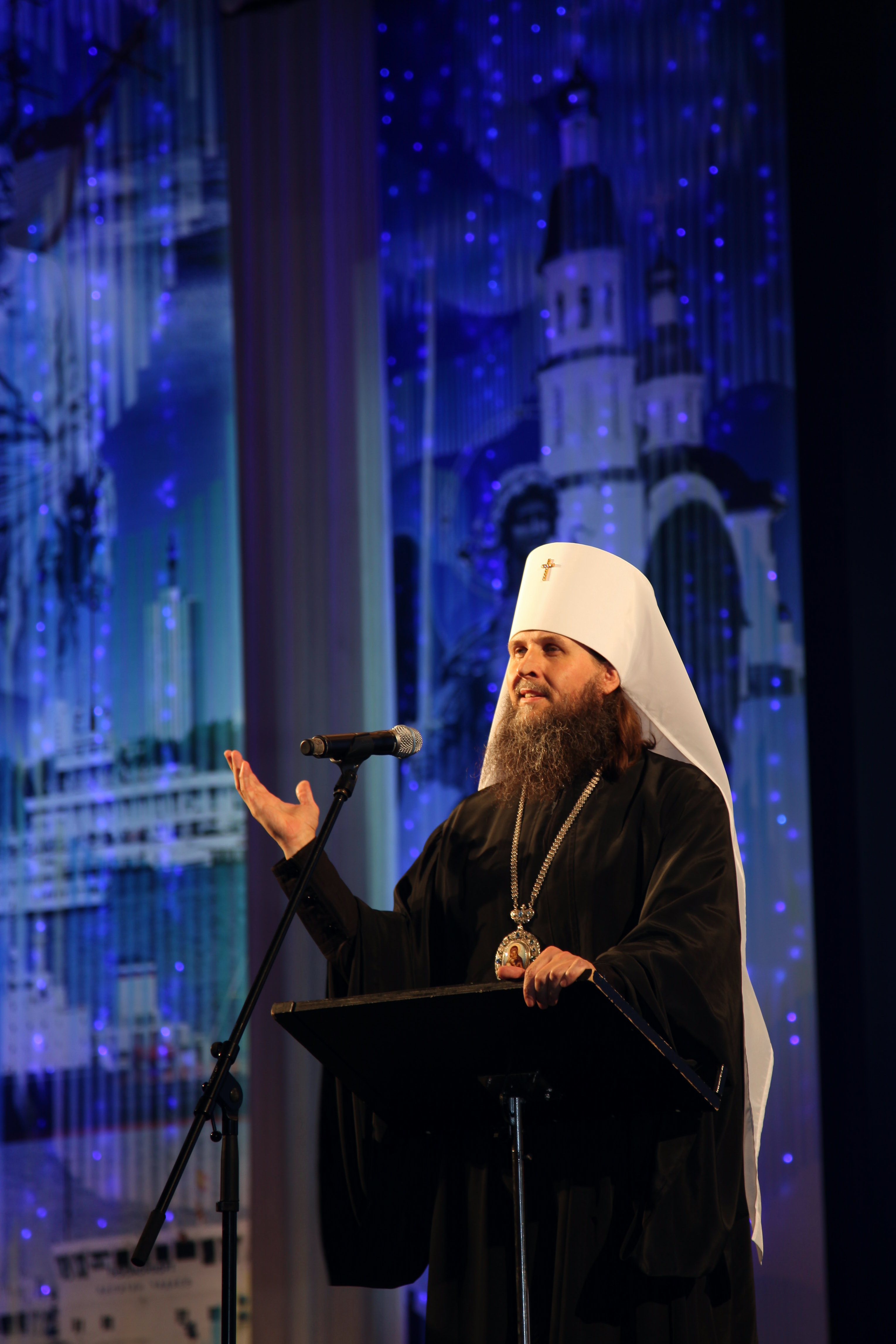 Епископ Русской православной церкви, митрополит Архангельский и Холмогорский, глава Архангельской митрополии Даниил (Доровских).